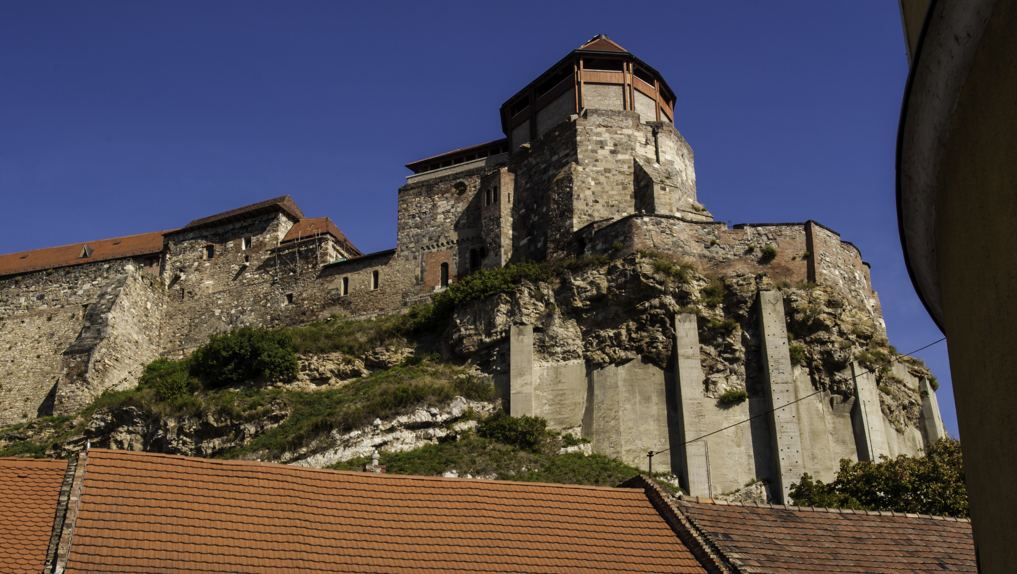 vár, a királyi, majd érseki palota maradványainak együttese This is a photo of a monument in Hungary. Identifier: 91100